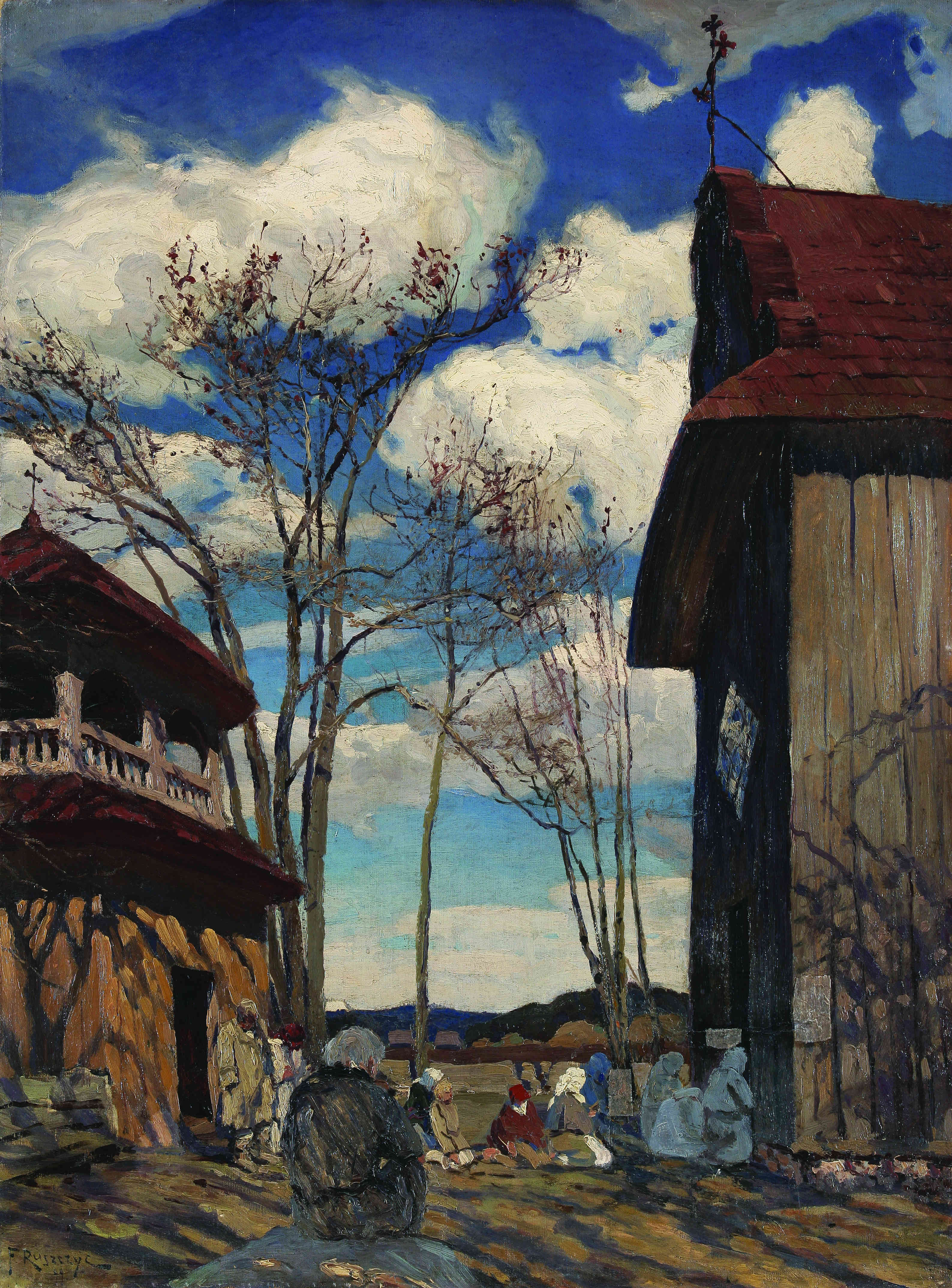 Костел в Богданове.